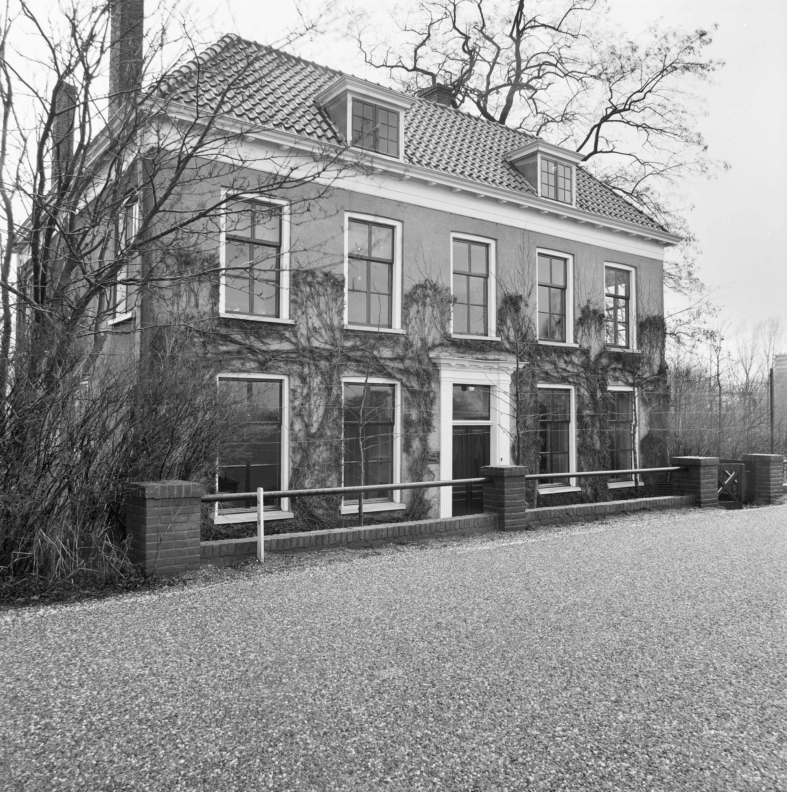 voorgevel